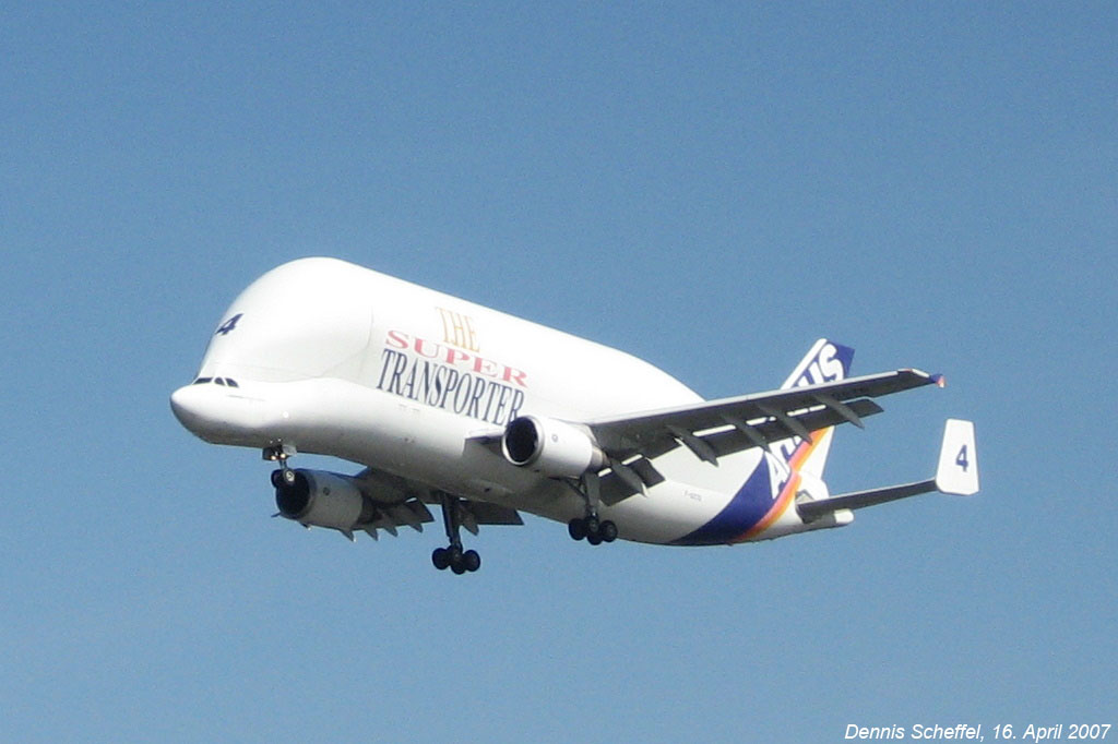 Airbus A300-600ST "Beluga", final approach, Hamburg Finkenwerder.